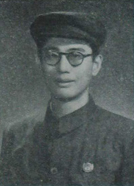 中文（台灣）: 中國人民政治協商會議第一屆全體會議代表